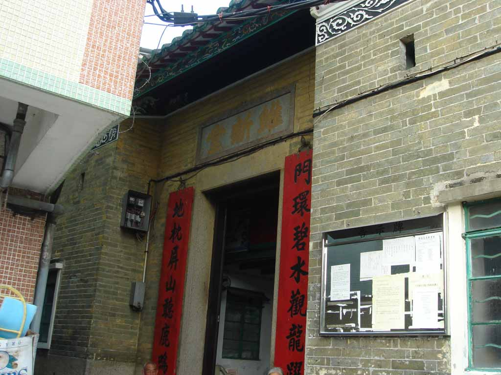 中文（香港）: 若虛書室。